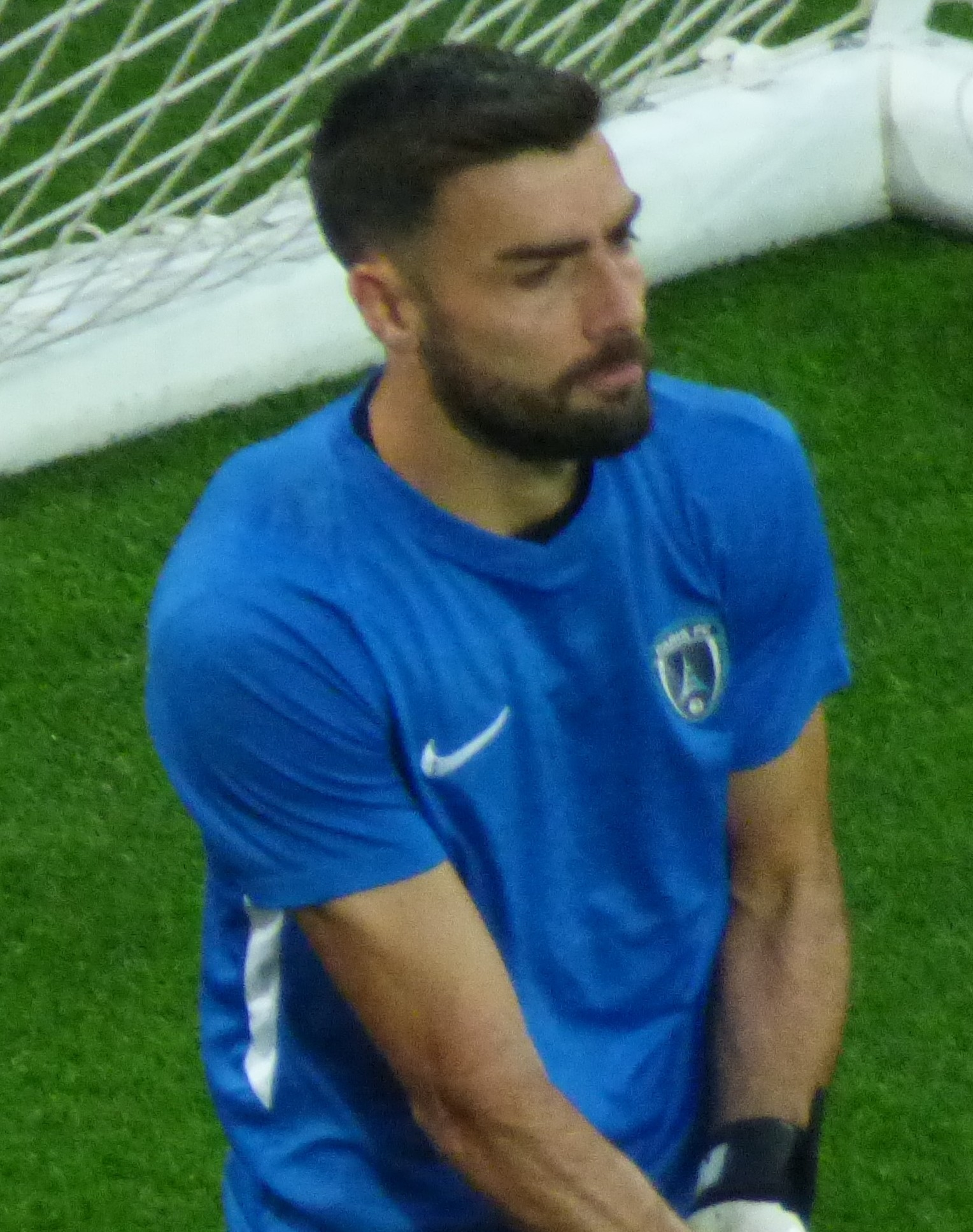 Vincent Demarconnay avant le match Lens / Paris, comptant pour la neuvième journée du championnat de France de football de Ligue 2, le 28 septembre 2018.